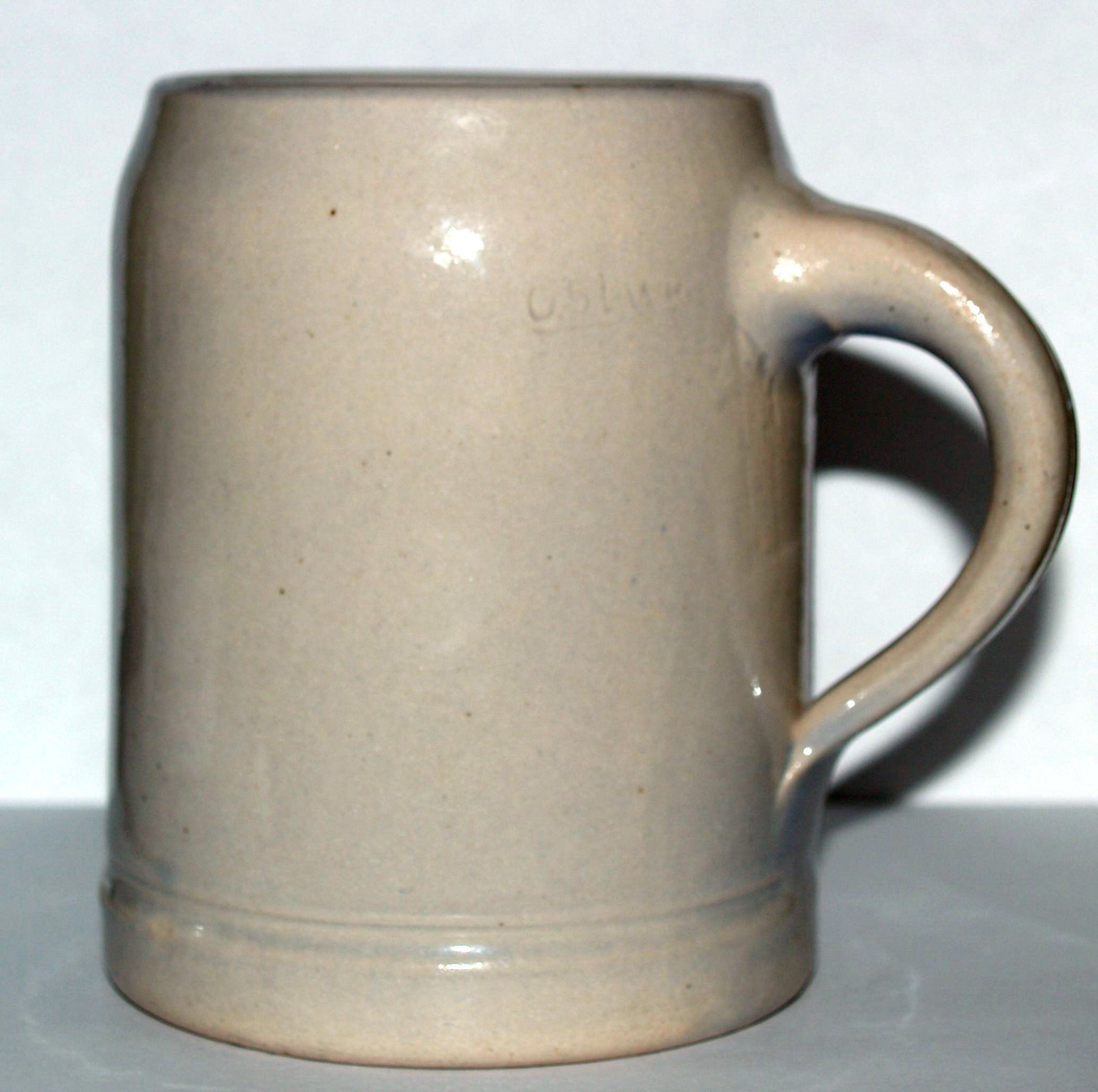 Ein typischer 0,5 Liter Steinkrug / Humpen.